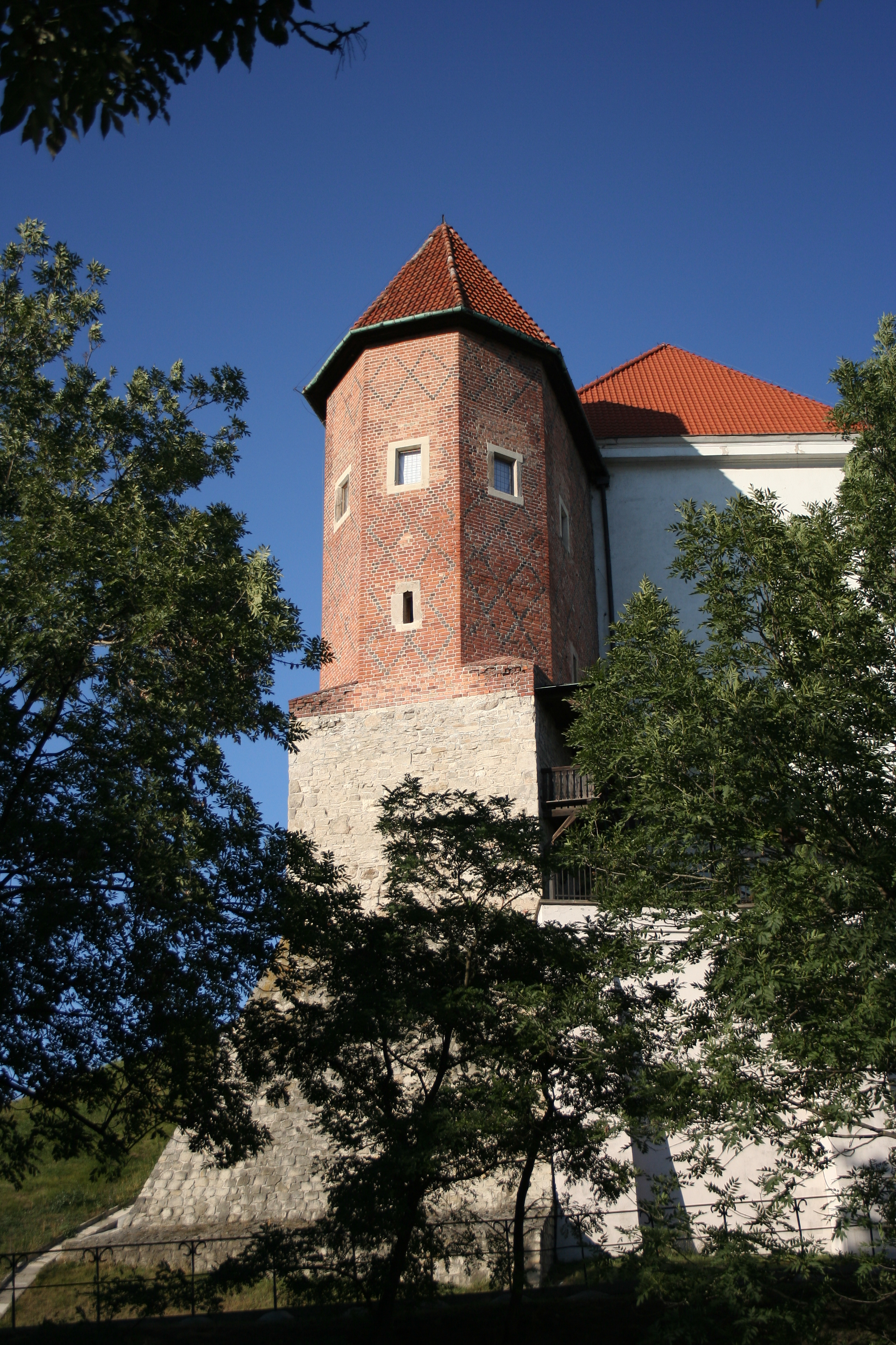 Sandomierz, ul. Zamkowa 12 - zamek królewski, obecnie muzeum okręgowe